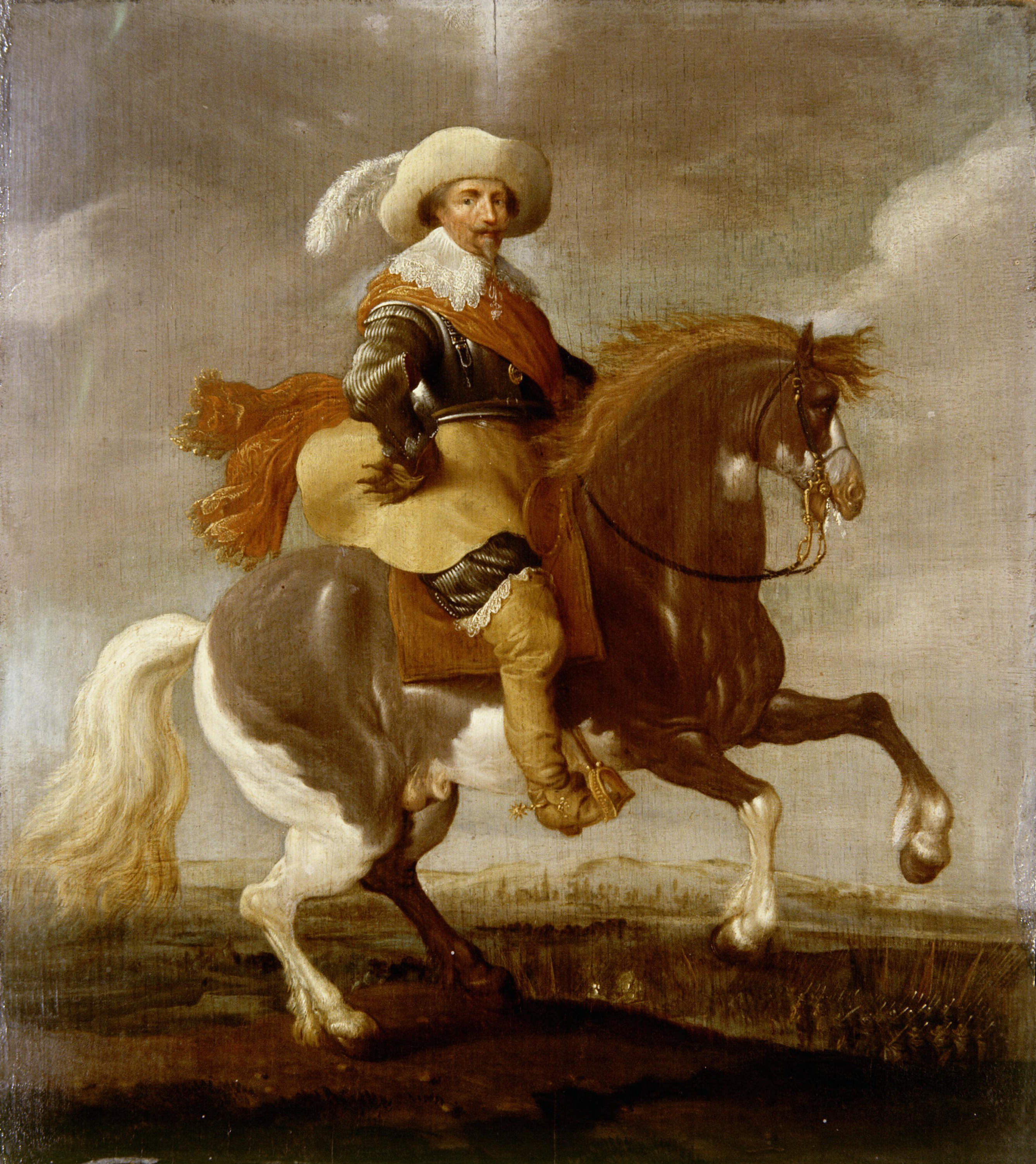 Portrait of Frederik Hendrik van Oranje- Nassau (1584-1647)